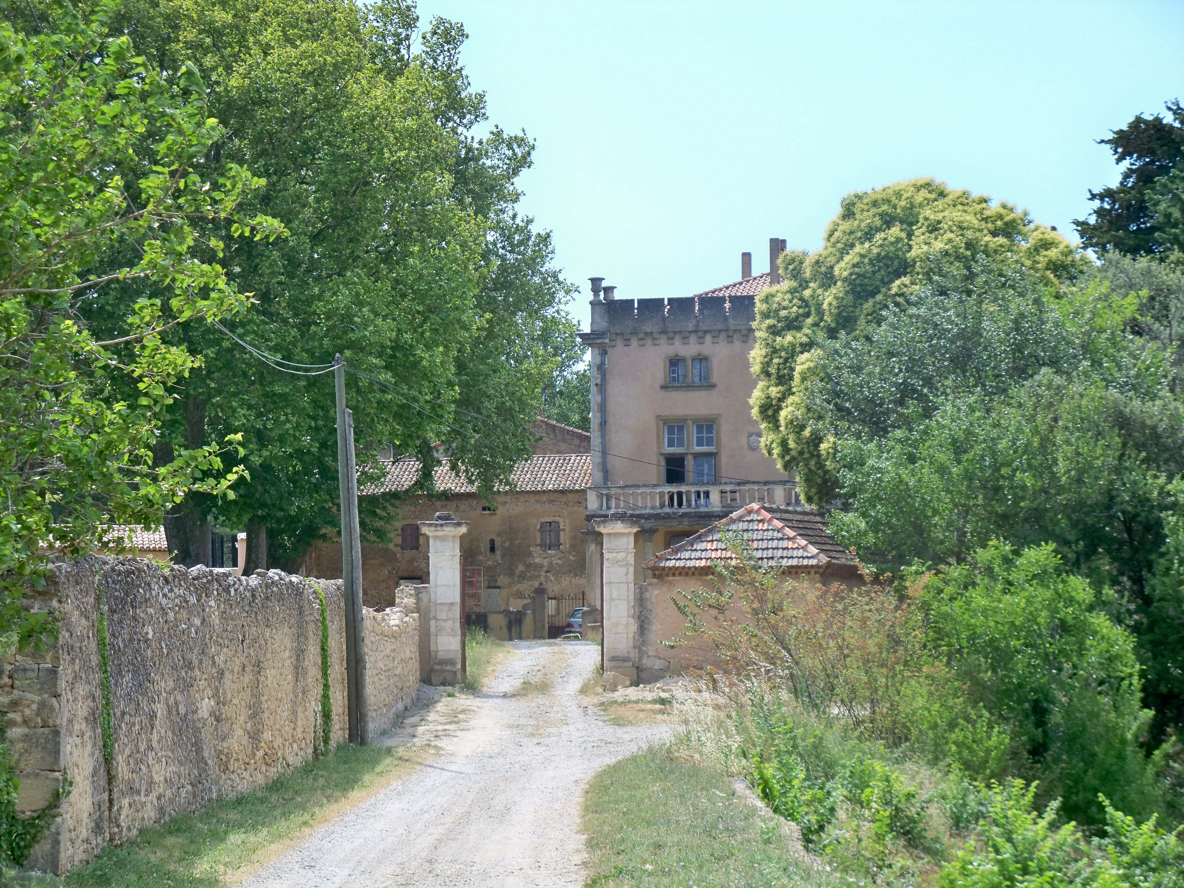 Château Fonsalette, AOC Massif d'Uchaux, Vaucluse